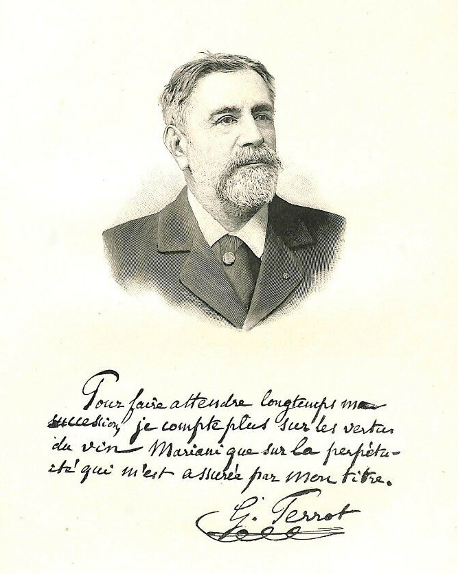 French archaeologist Georges Perrot (1832-1914)